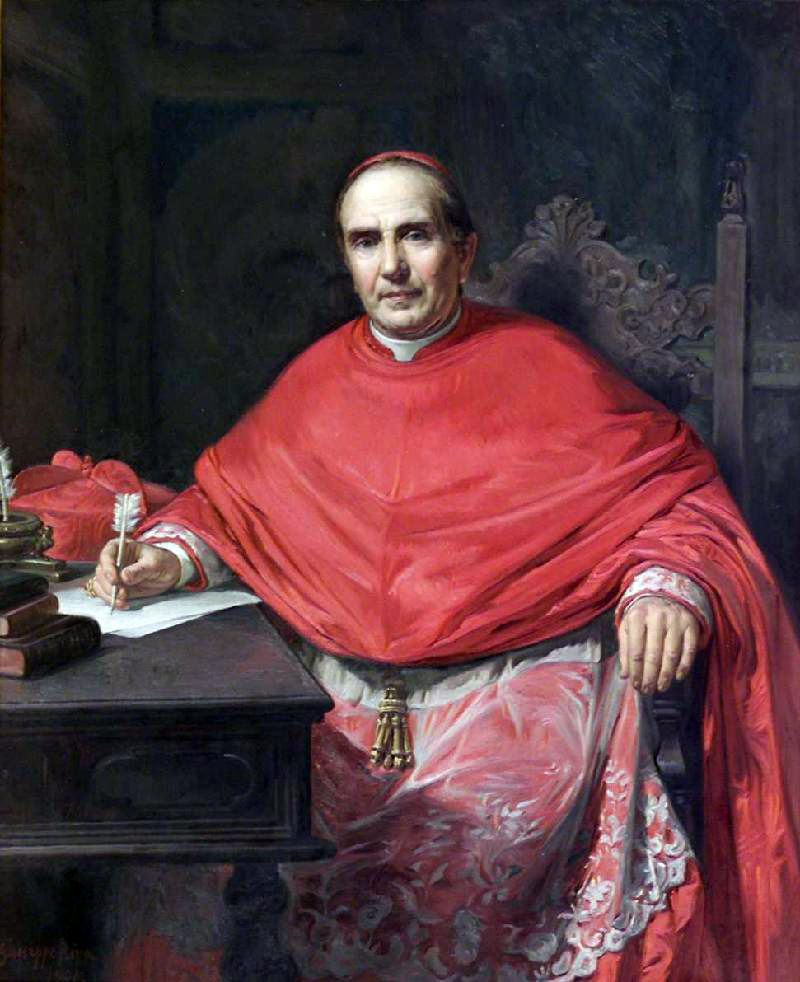 Giuseppe Riva, 'Ritratto del cardinale Felice Cavagnis, 1901